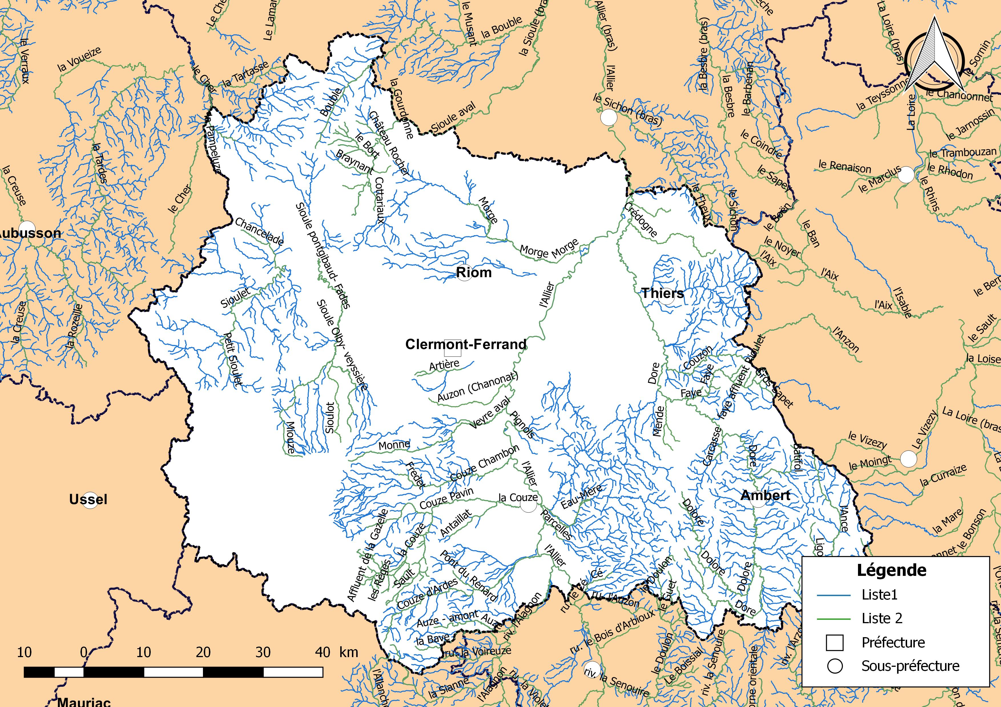 Classement des cours d'eau du département du Puy-de-Dôme (France) au titre de la continuité écologique (article L214.17 I du Code de l'environnement).